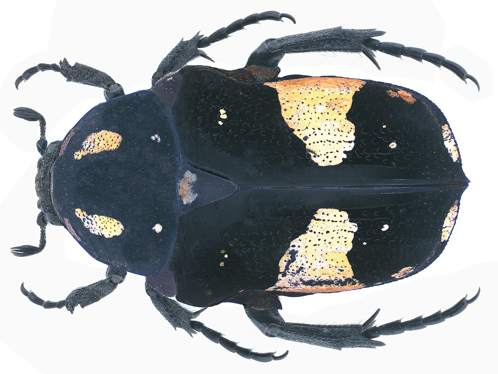 Familie: Scarabaeidae Grösse: 14,3-16,8 mm Fundort: Philippinen, Mindanao, Surigao leg. 1958; det. U.Schmidt Foto: U.Schmidt, 2006